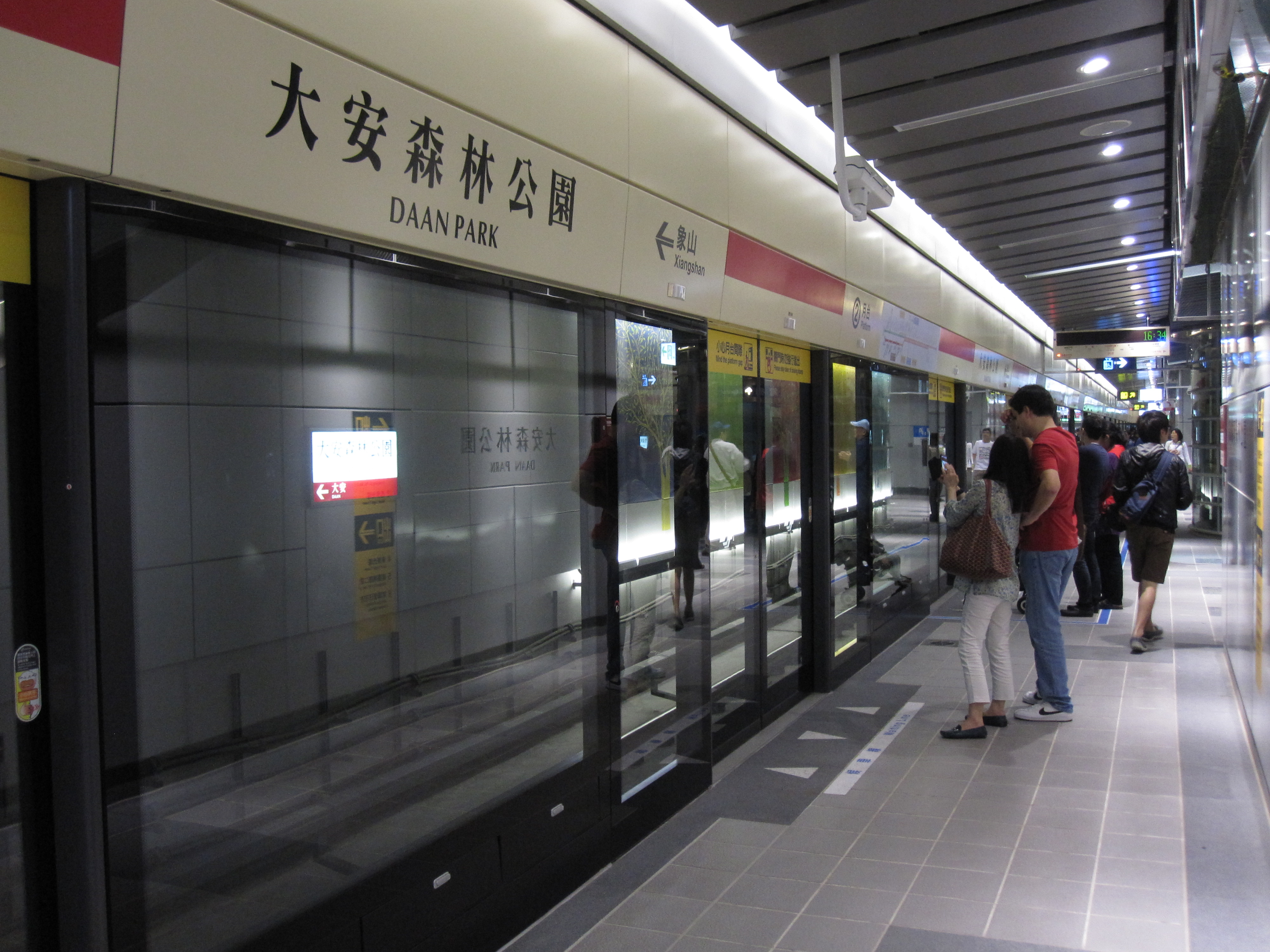 台北捷運信義線大安森林公園站月台2。